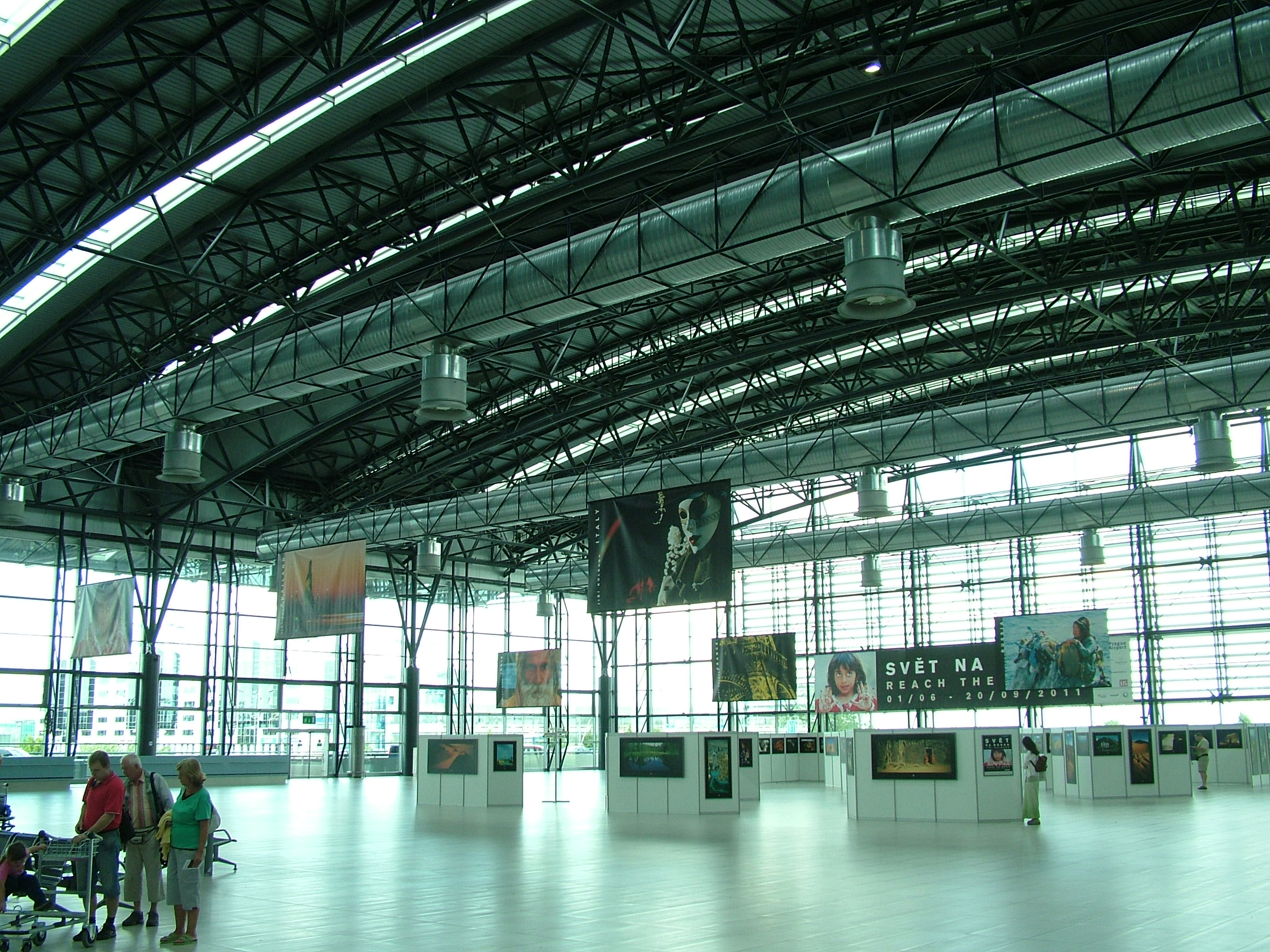 Fotografická výstava Jiří Kolbaba: SVĚT NA DOSAH v odletovém Terminálu 2 Letiště Praha - Ruzyně